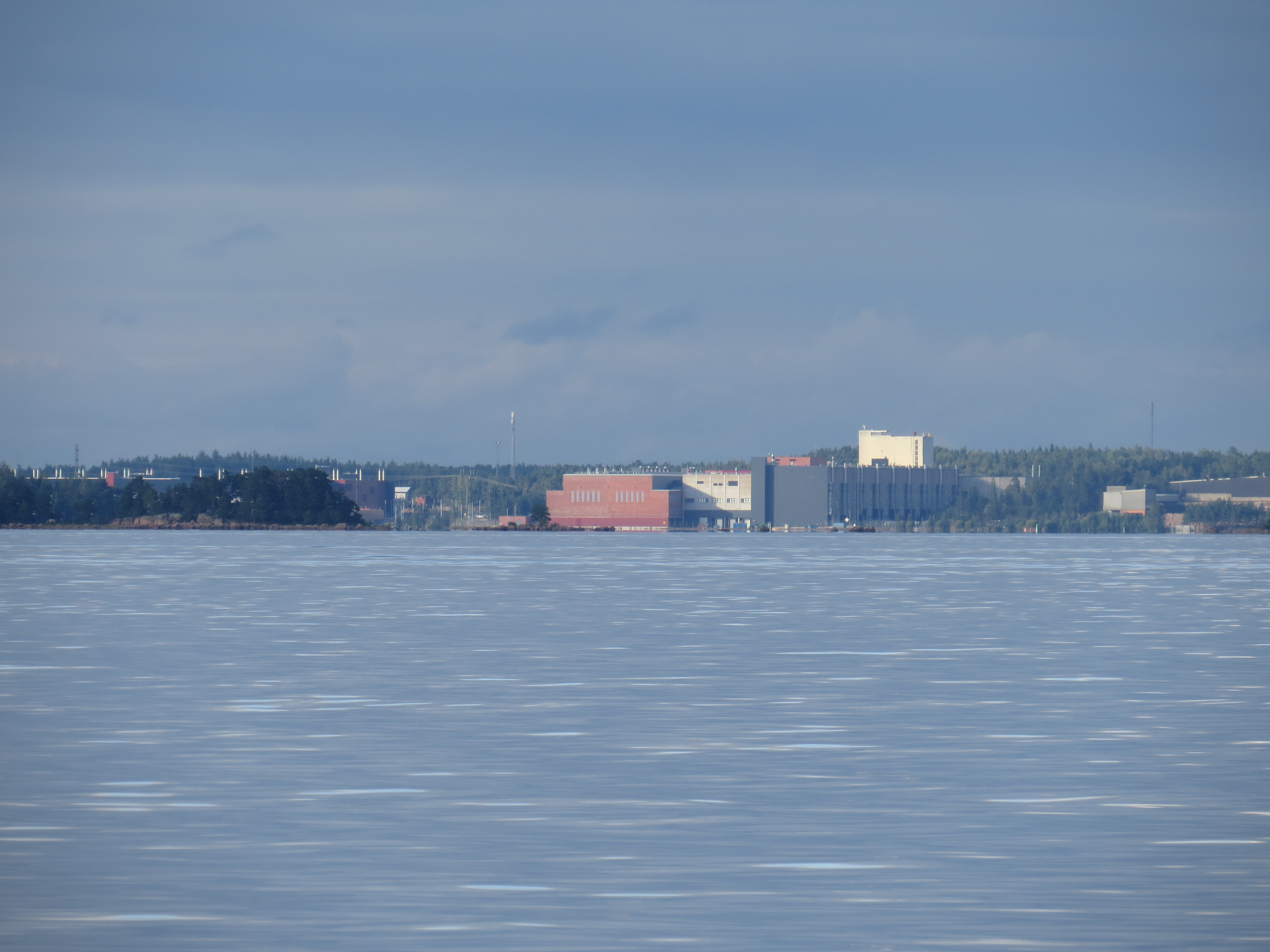 Googlen palvelinkeskus entisen Summan paperitehtaan alueella Haminassa.